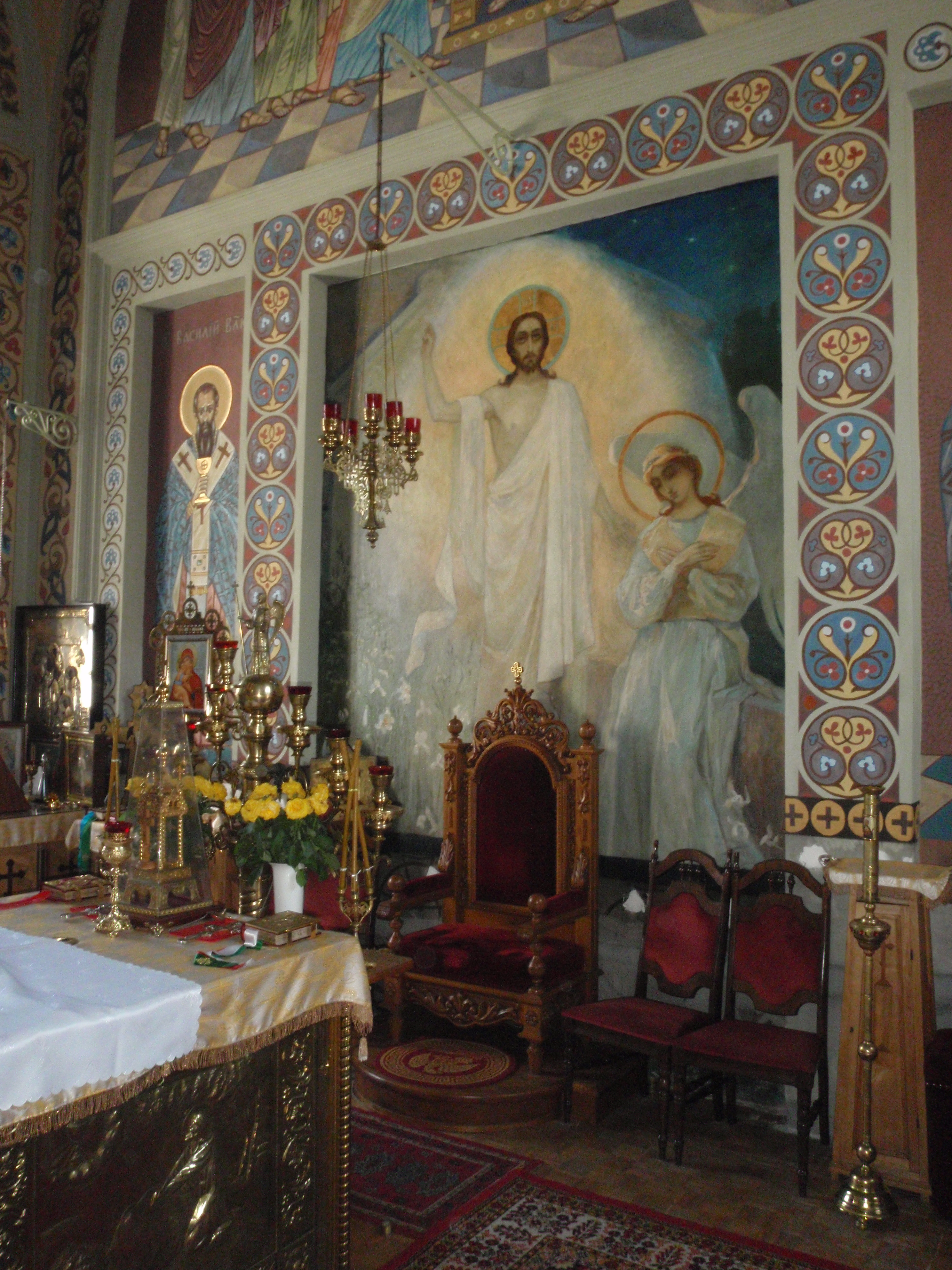 Ołtarz Soboru Św. Mikołaja w Białymstoku